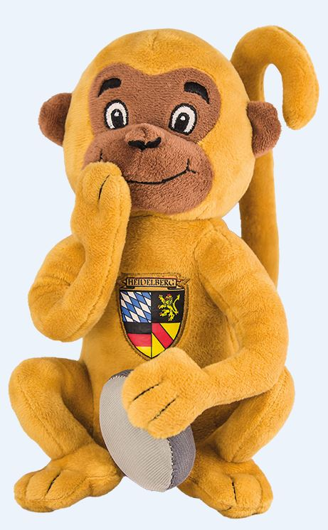 Der Heidelberger Brückenaffe als Plüschtier